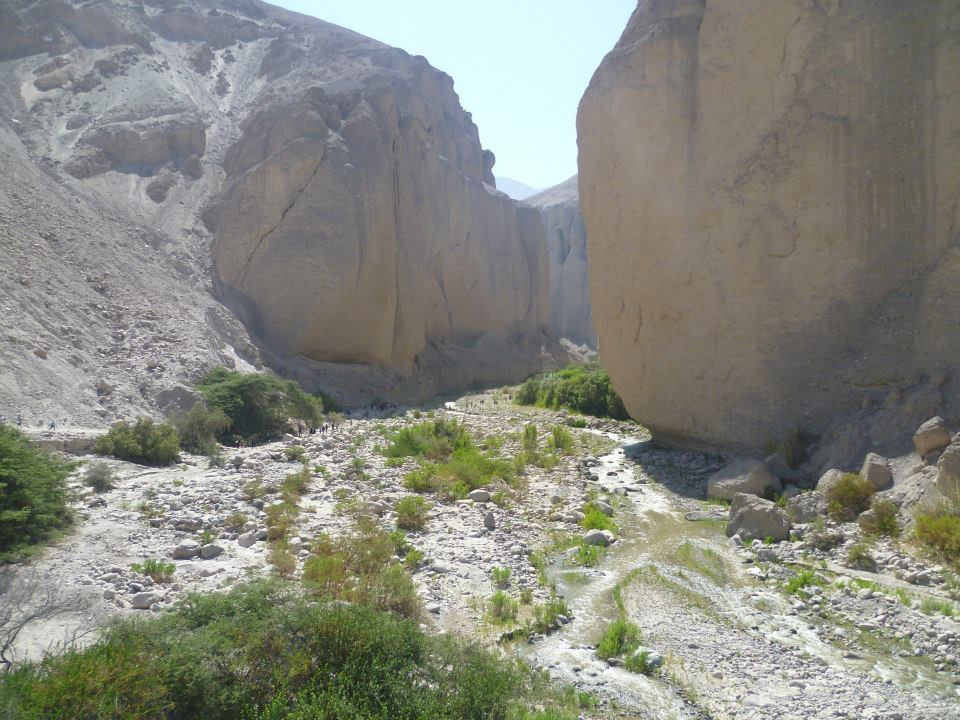 Los cerros de Livílcar, camino a la Peñas